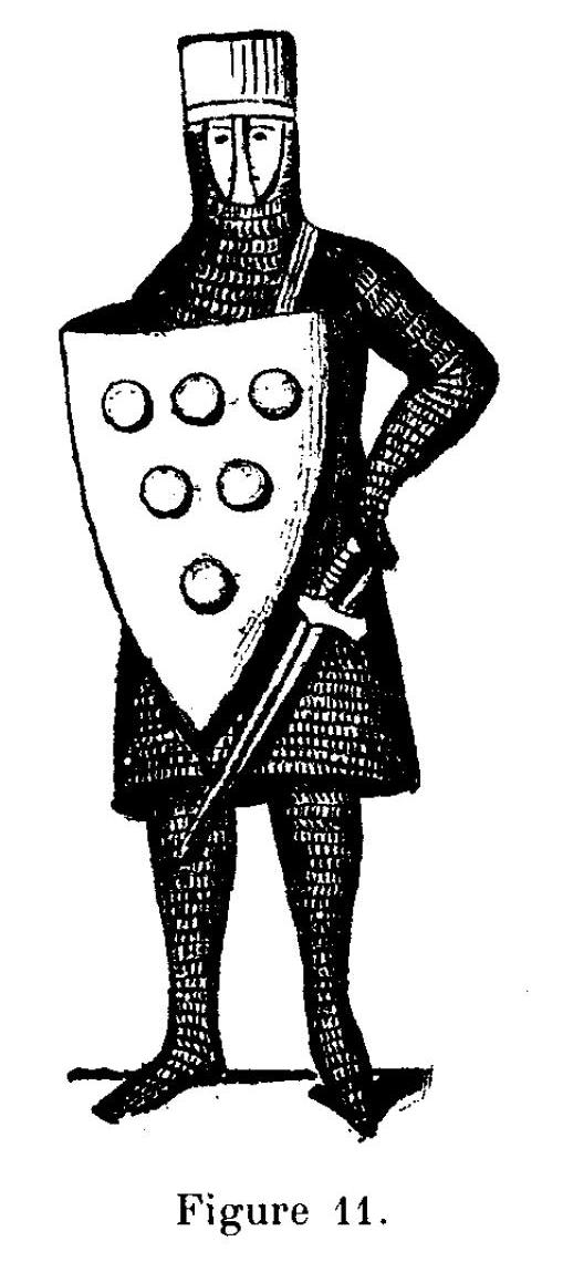 Le Donjon de Courmenant, ses origines, ses seigneurs et possesseurs, son musée